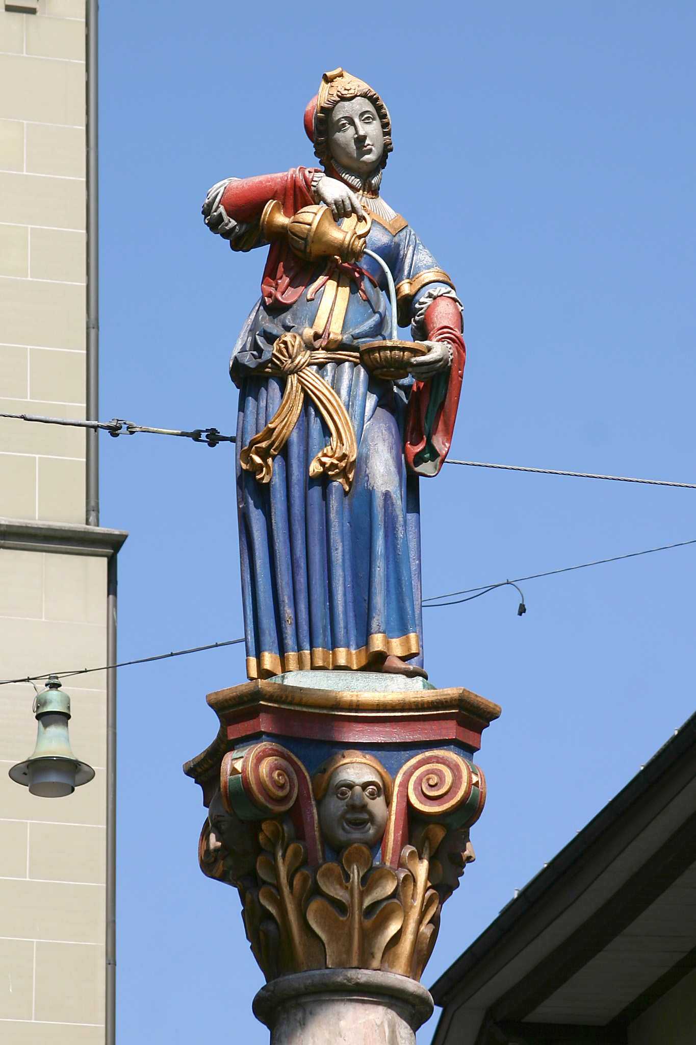 Anna-Seiler-Brunnen, Bern, Switzerland